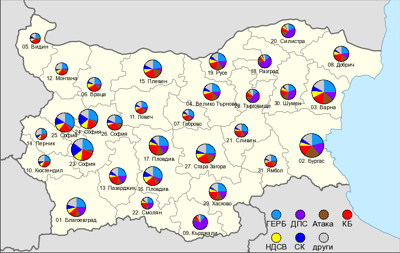 Избори за Европейски парламент в България през 2009: подадени гласове по район